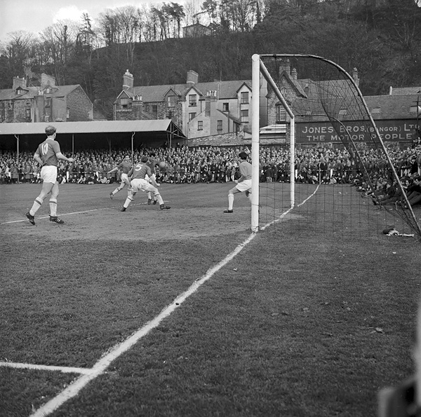 Teitl Cymraeg/Welsh title: Dinas Bangor yn erbyn Dinas Caerdydd yng nghystadleuaeth Cwpan Cymru Ffotograffydd/Photographer: Geoff Charles (1909-2002) Nodyn/Note: Dyddiad/Date: 1/5/1964 Cyfrwng/Medium: Negydd ffilm / Film negative Cyfeiriad/Reference: (gch36233) Rhif cofnod / Record no.: 3471959 Rhagor o wybodaeth am gasgliad Geoff Charles yn Llyfrgell Genedlaethol Cymru More information about the Geoff Charles Collection at the National Library of Wales Mae ffotograffau Geoff Charles hefyd yn rhan o Broject Europeana Libraries Geoff Charles' photographs also form part of the Europeana Libraries Project